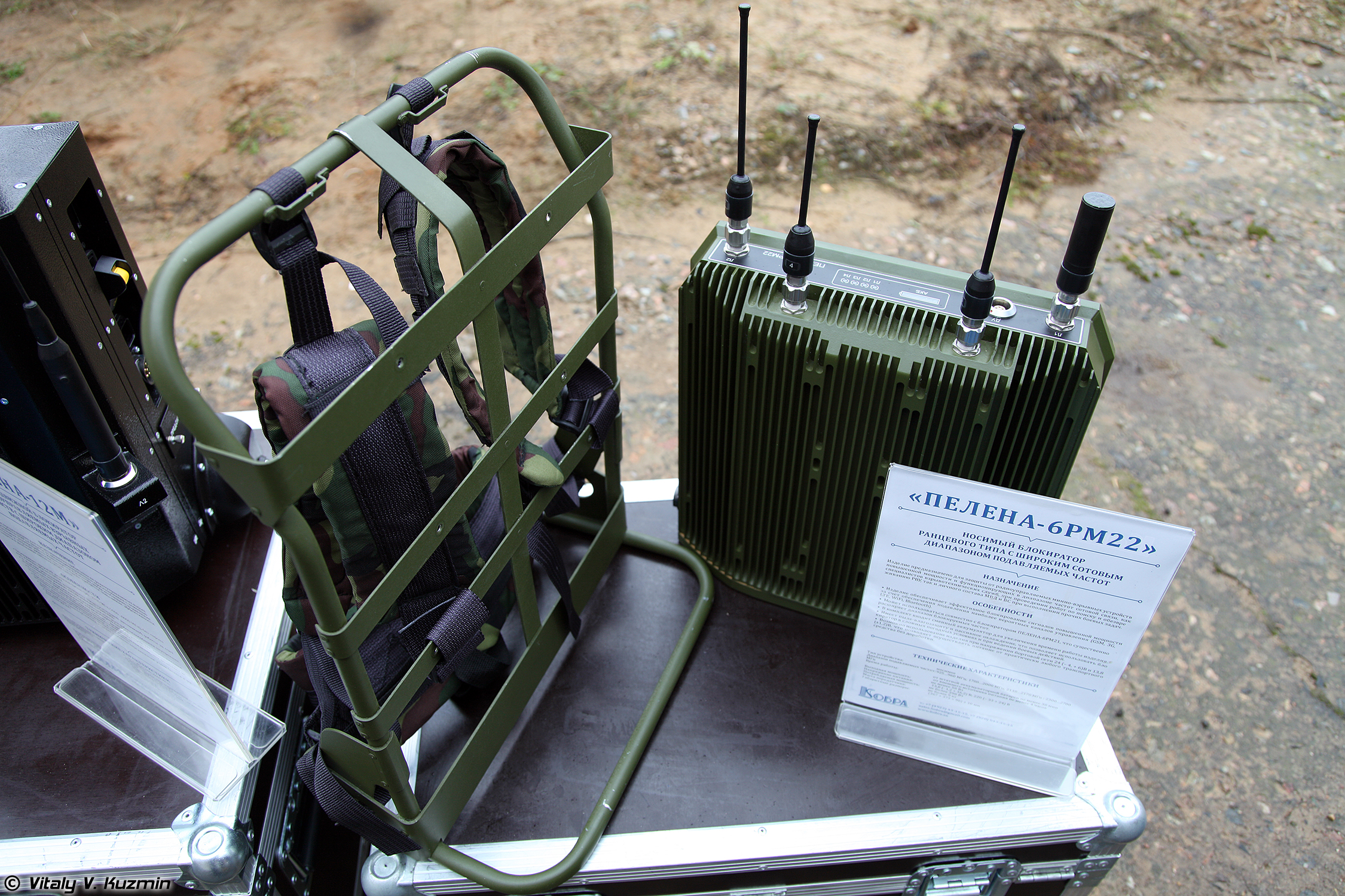 Носимый блокиратор Пелена-6РМ22